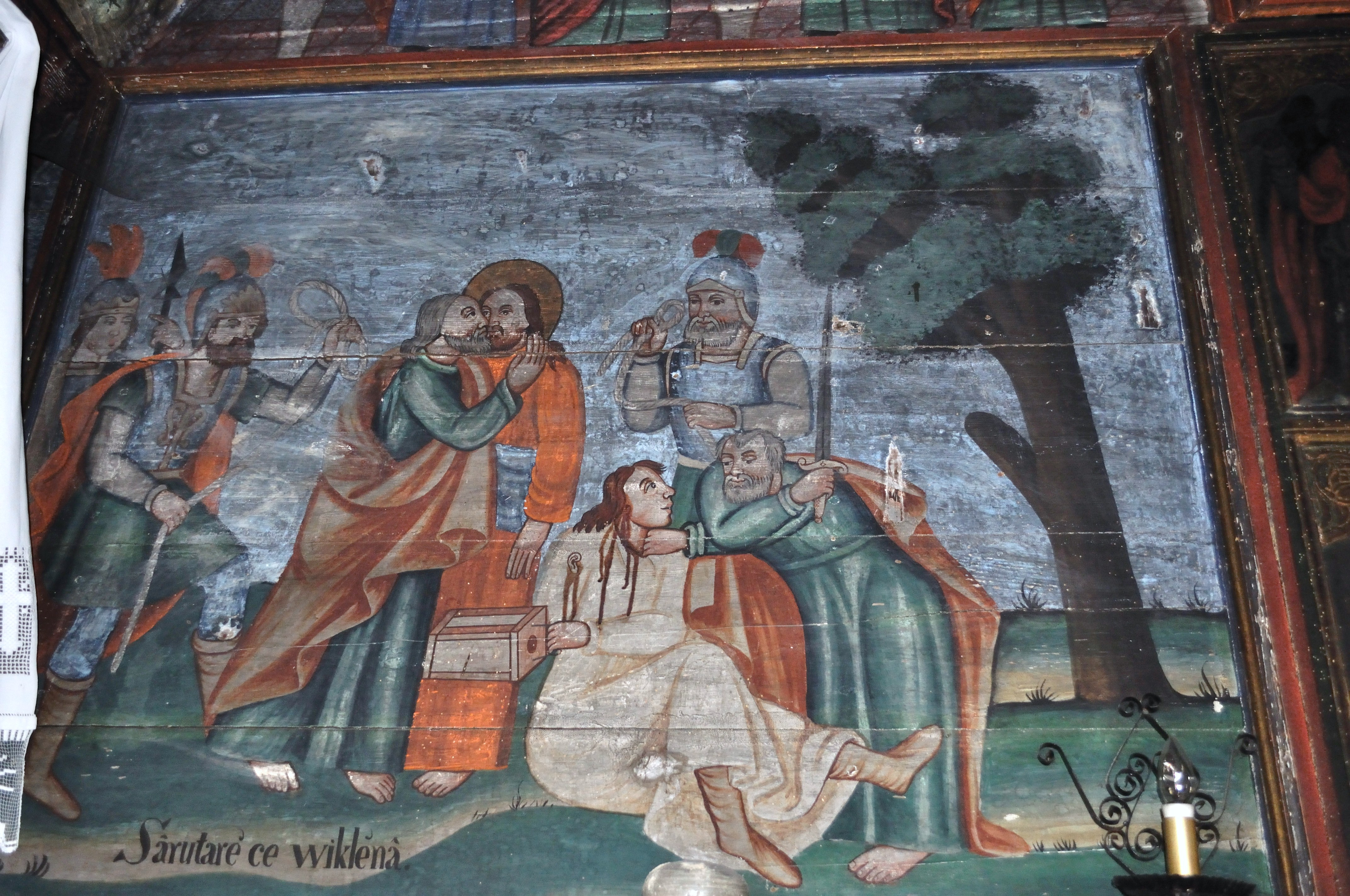 Biserica de lemn „Sfinții Arhangheli” din Ciuleni, județul Cluj